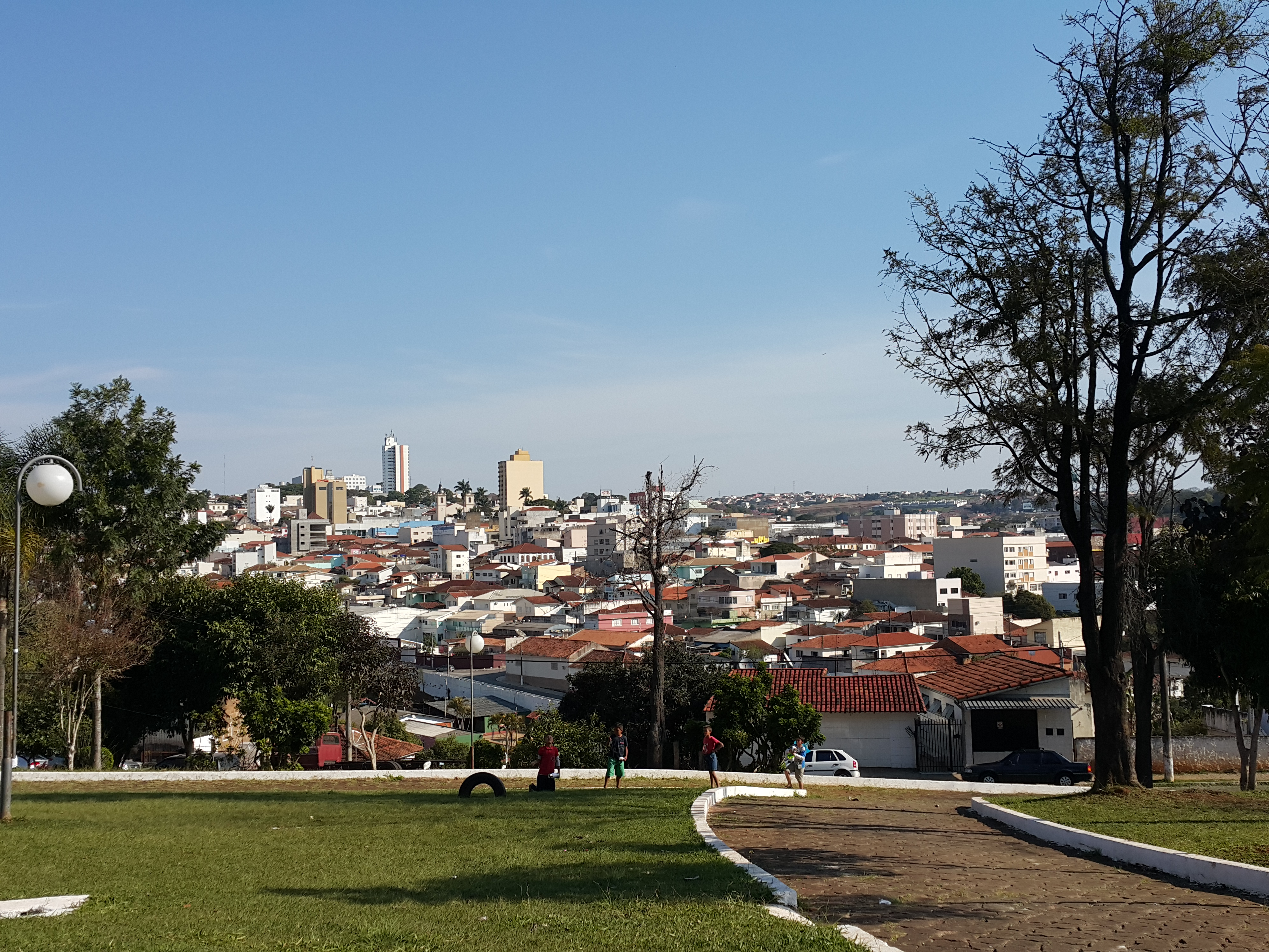 vista do centro a partir da vila santana